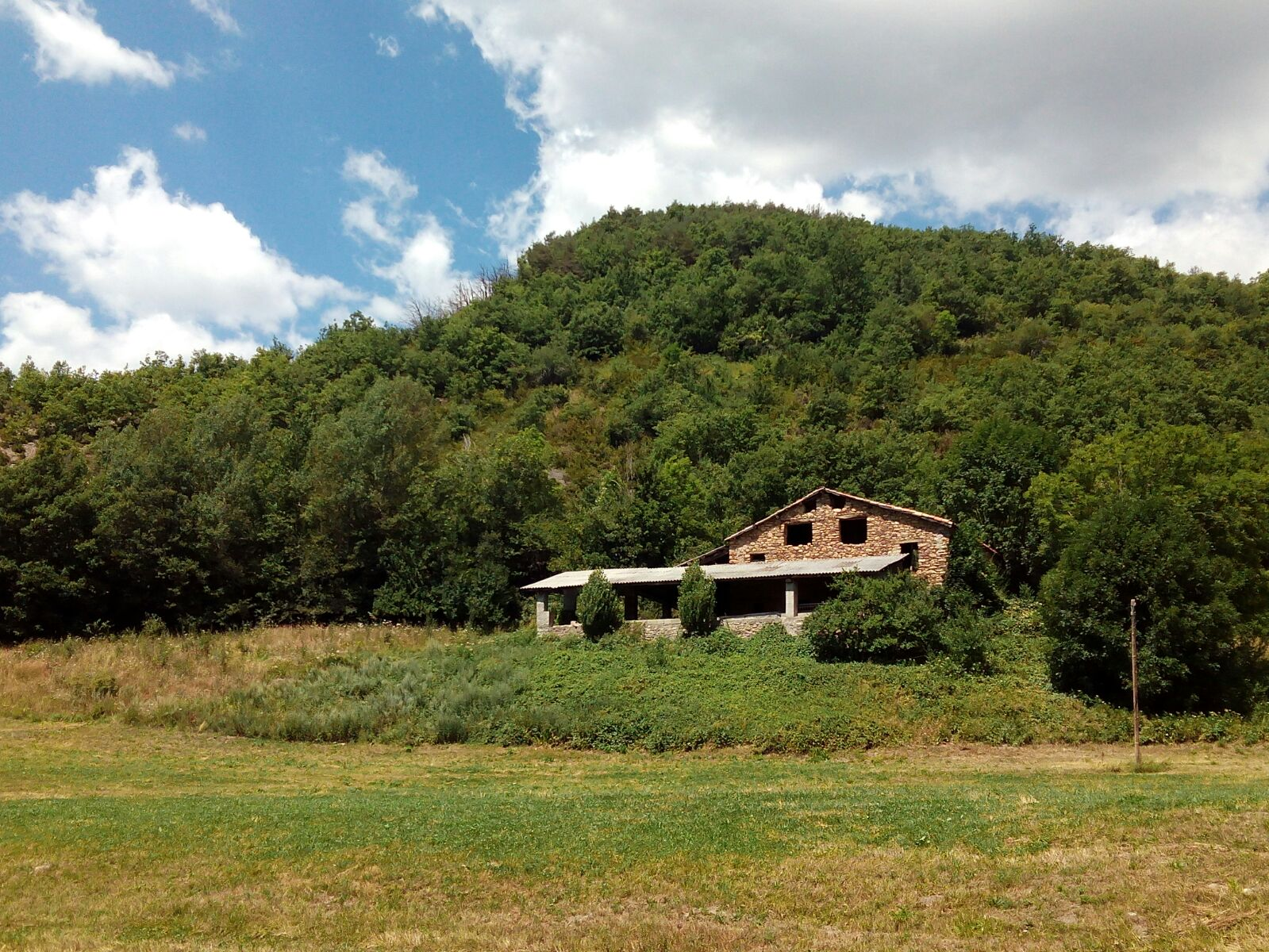 Uno de los lugares donde torturaban y apedreaban brujas